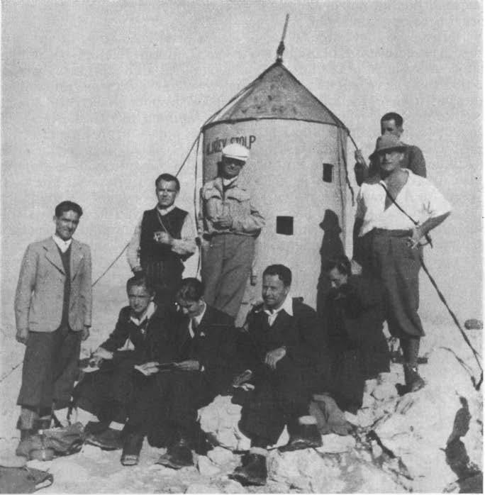 Kralj Peter II. na Triglavu